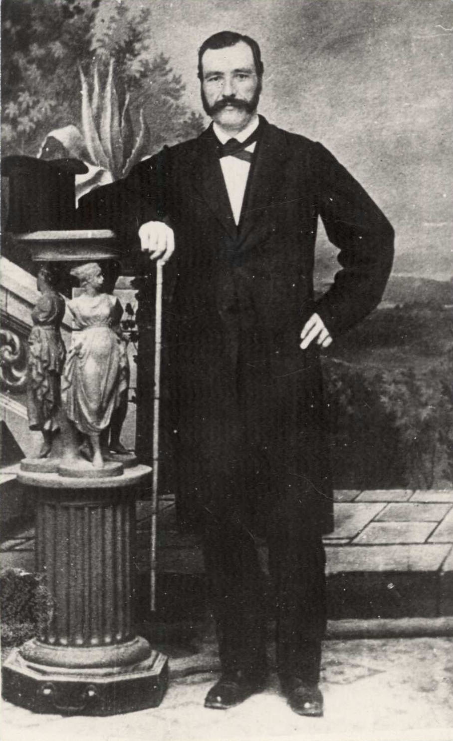 Георги Раковски в Атина